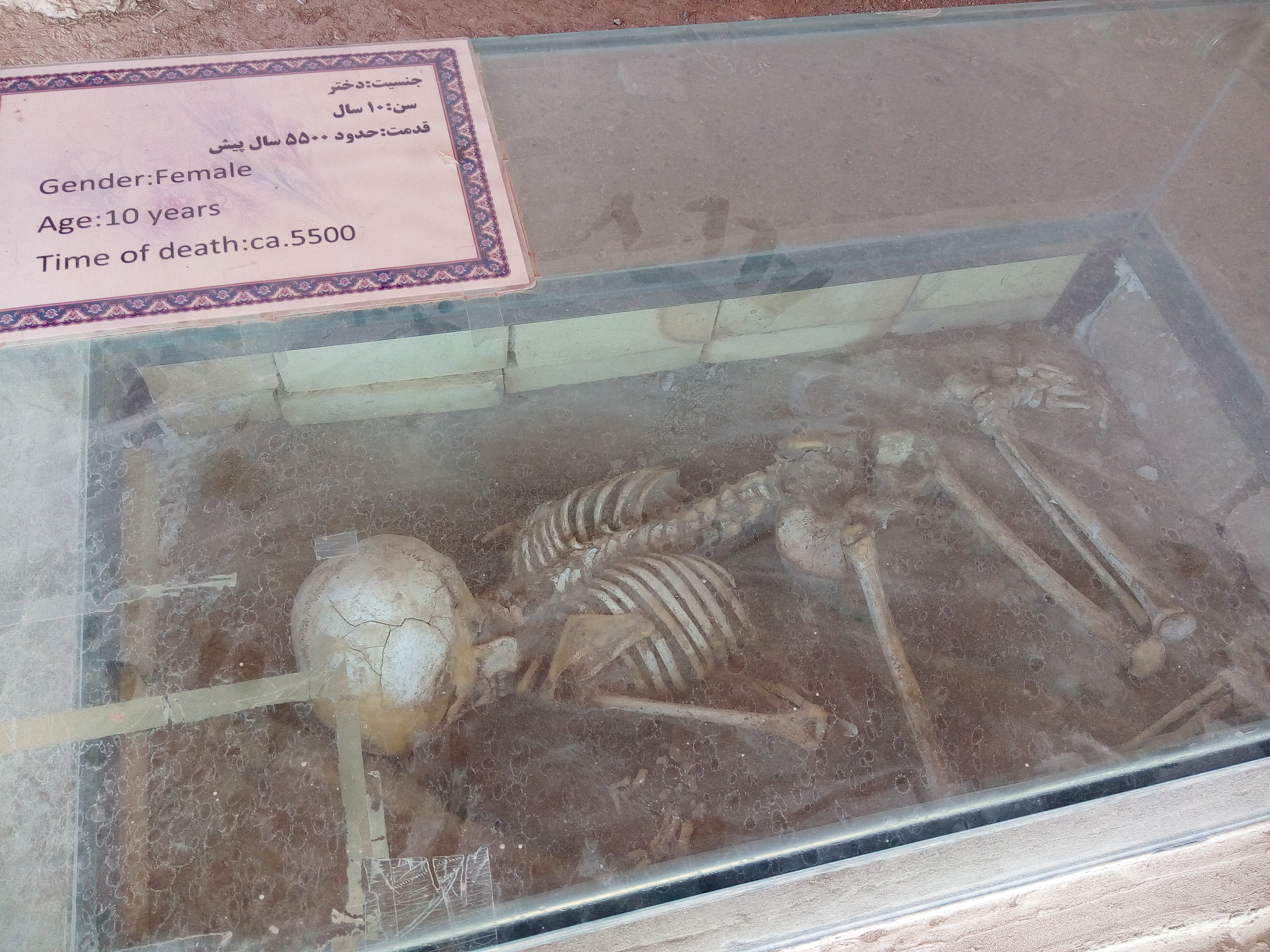 مکان و اطراف یک معبد (تپه سیلک)